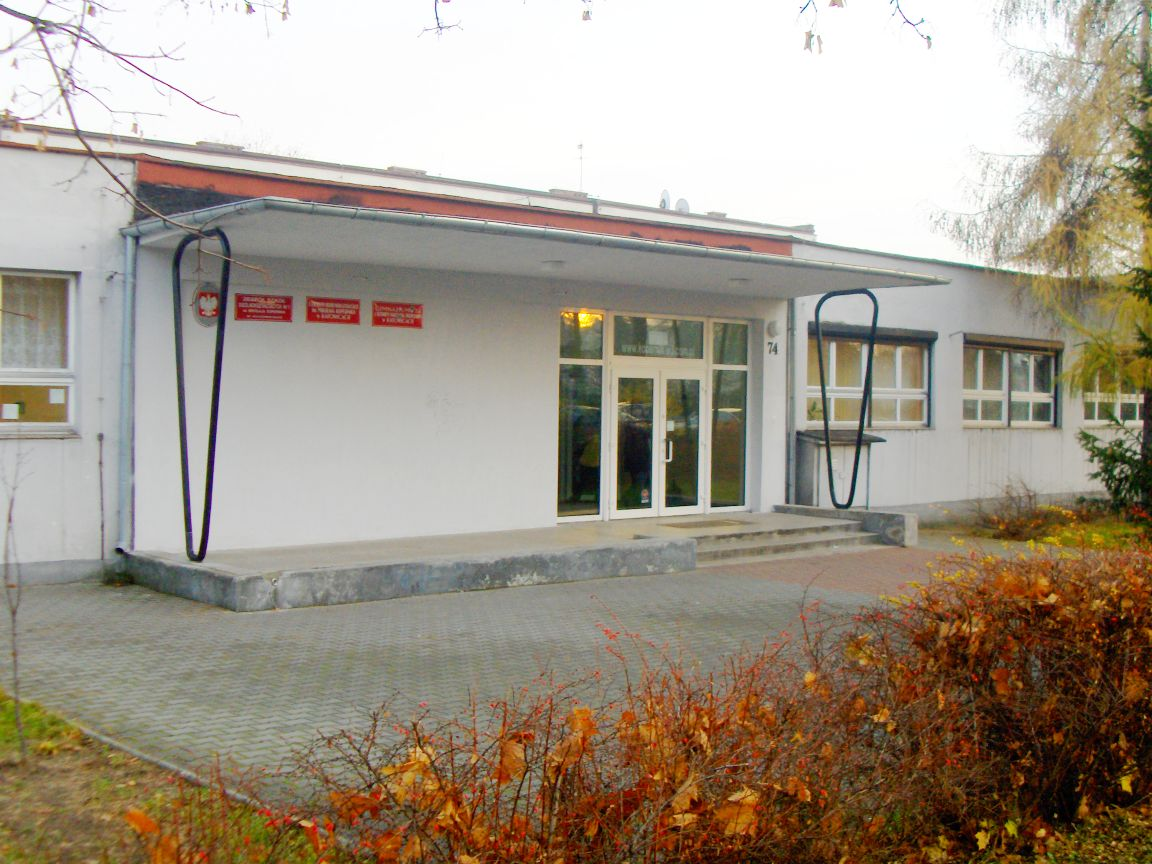 Zdjęcie ILO im. Mikołaja Kopernika w Katowicach